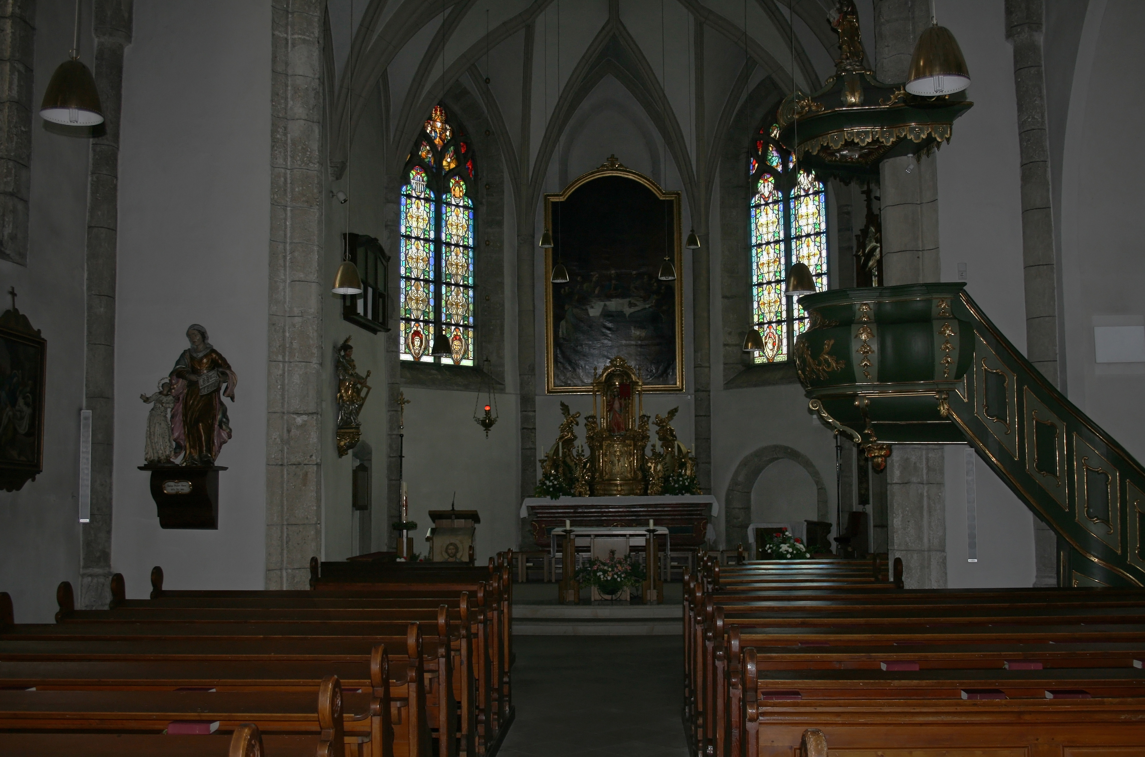 Der Innenraum der Mollner Pfarrkirche mit Blick zum Tabernakel-Hochaltar